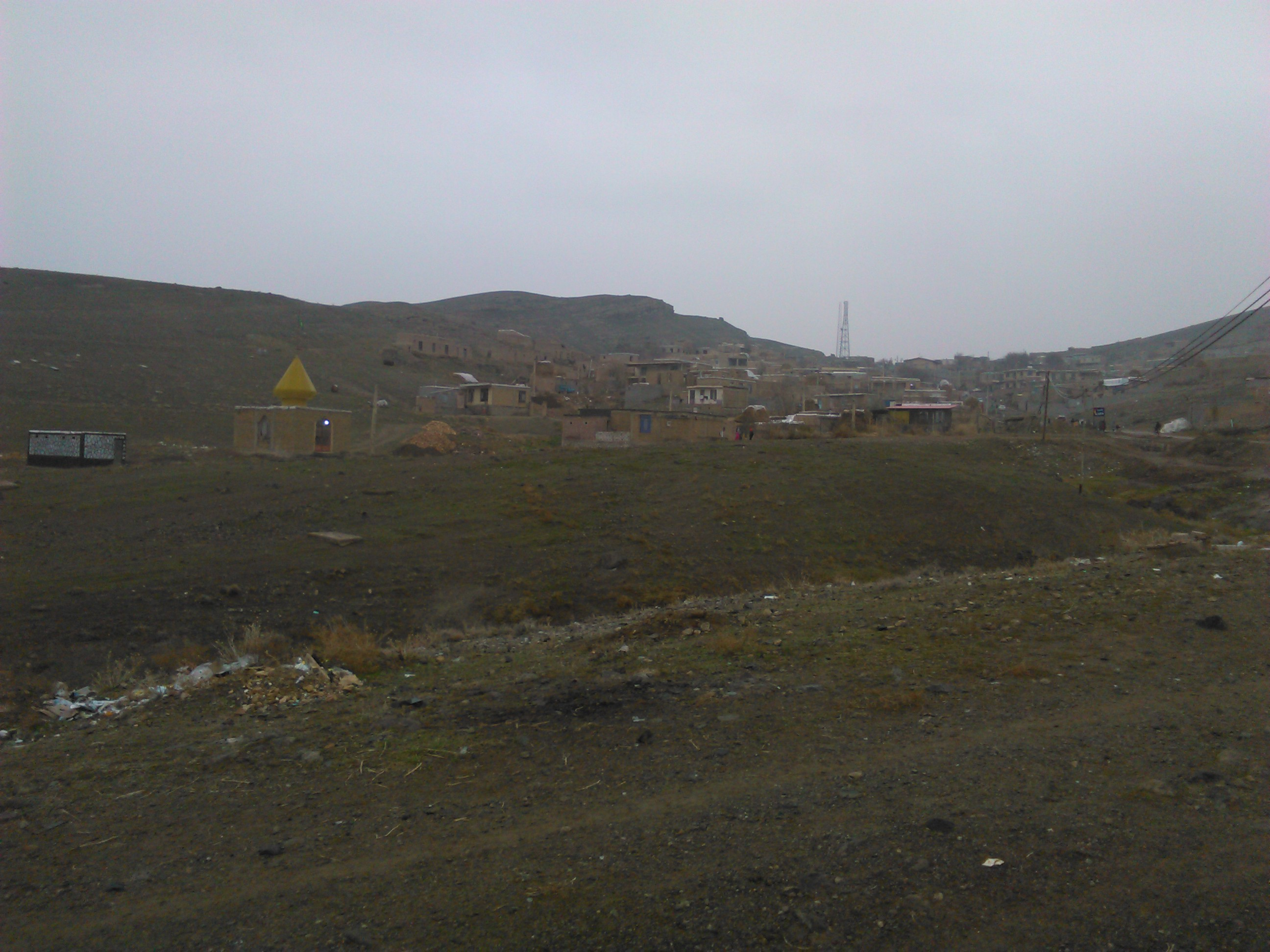 نمایی از روستای لیوار بالا